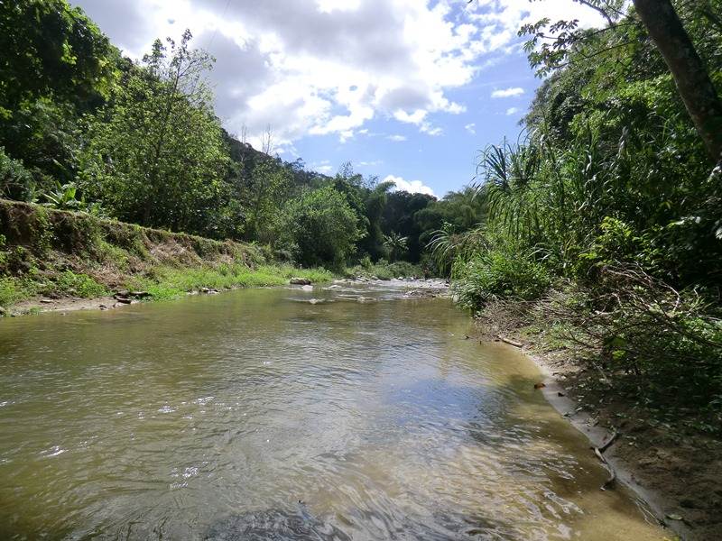 Río Pacairigua en Guatire. Estado Miranda. Venezuela